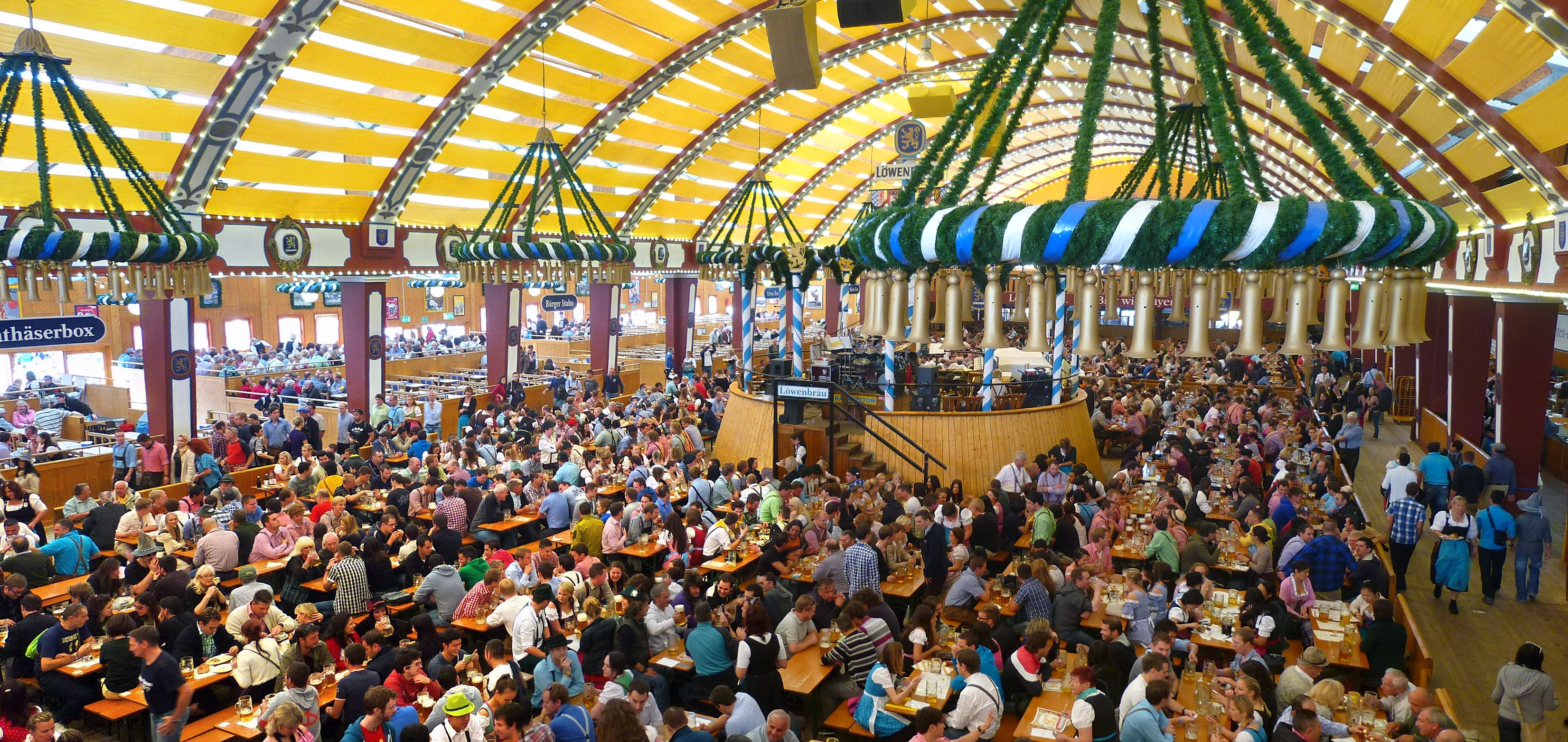 München, Löwenbräu-Festhalle, Oktoberfest 2012